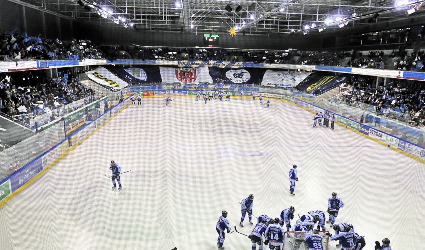 Choreographie zu "100 Jahre Eishockey in Dresden", Logos des ESC Dresden, SC Einheit Dresden, BSG Kraftverkehr, Dresdner Eislöwen